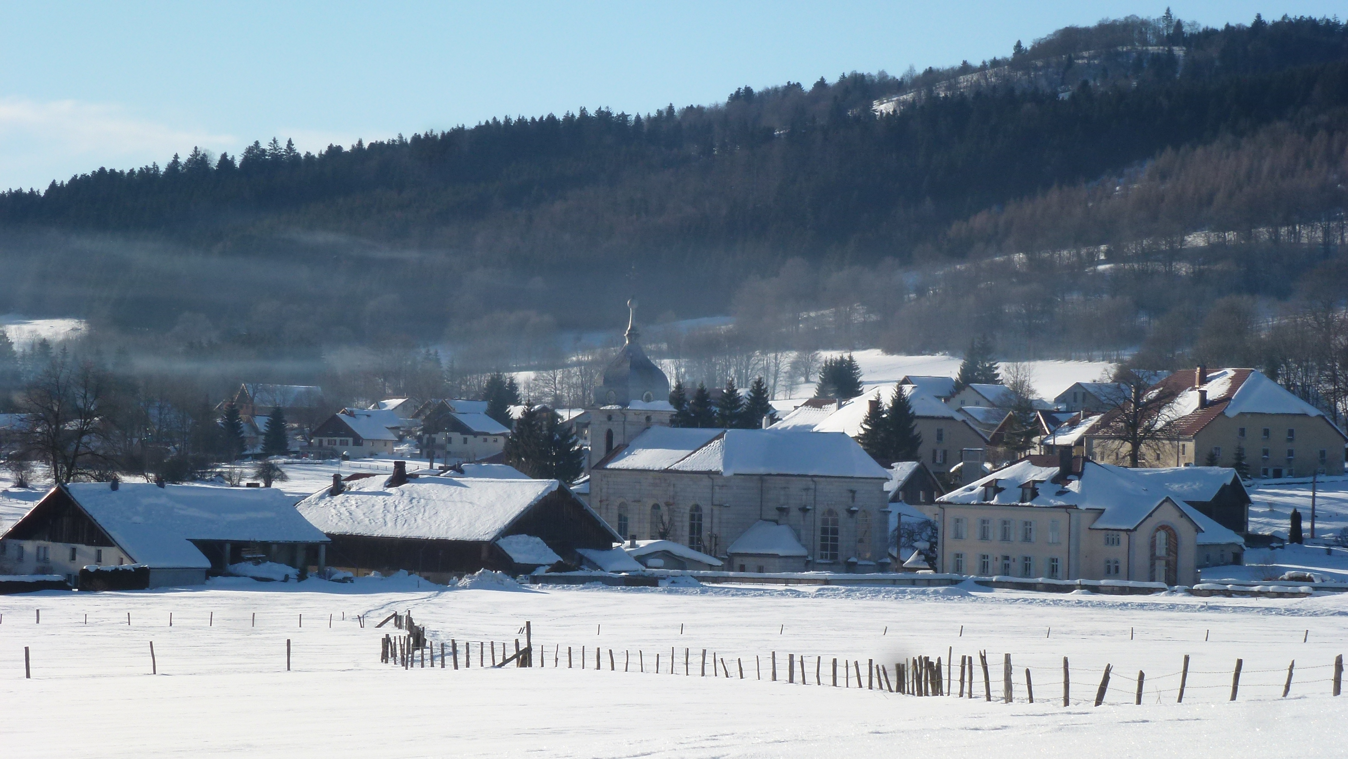 Paysage hivernal à La Chaux-de-Gilley. L'église et le village.